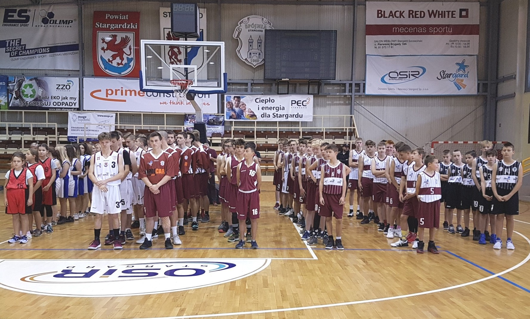 Młodzi wychowankowie Spójni Stargard